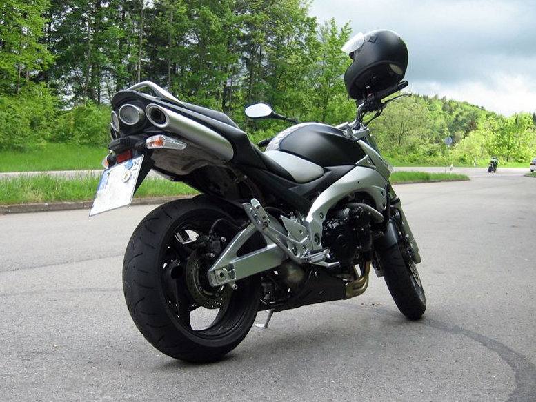 Suzuki GSR 600